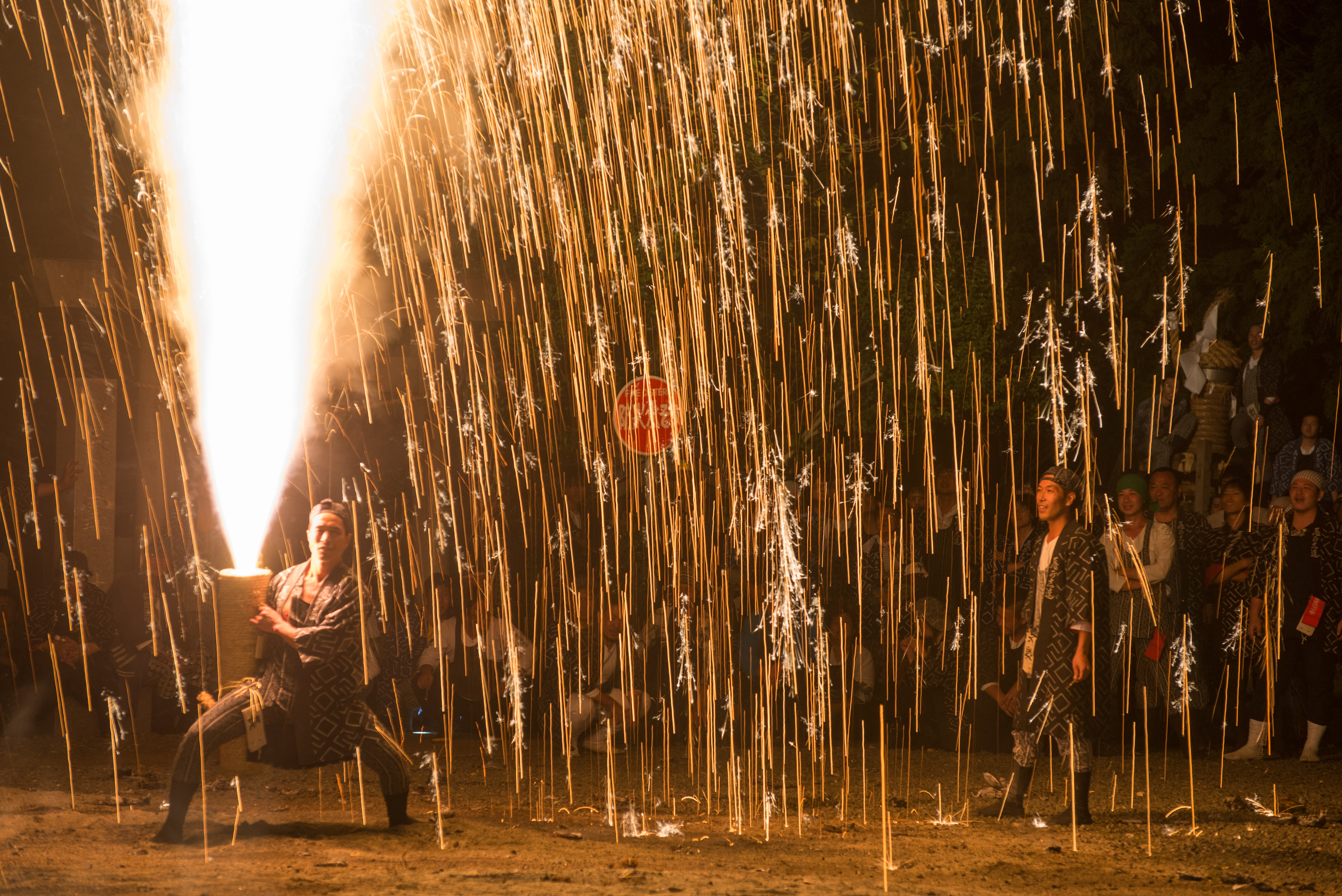 手筒花火(Tezutsu Fireworks)